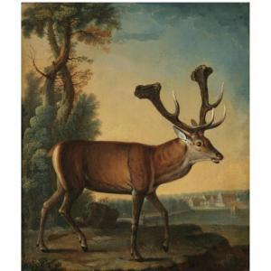 Schaufelhirsch